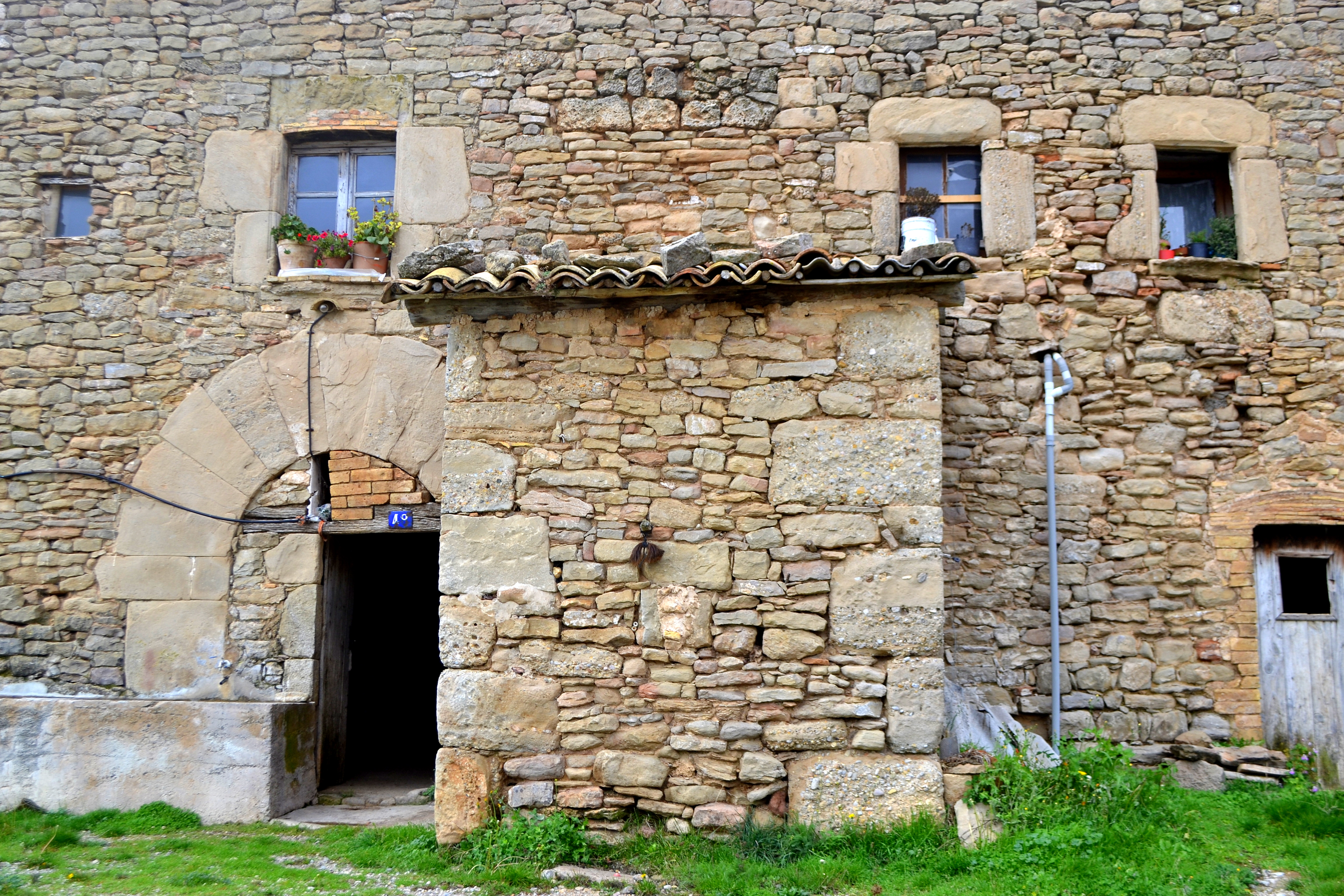 Masia Casòliva de Sant Quintí de Taravil (Capolat)